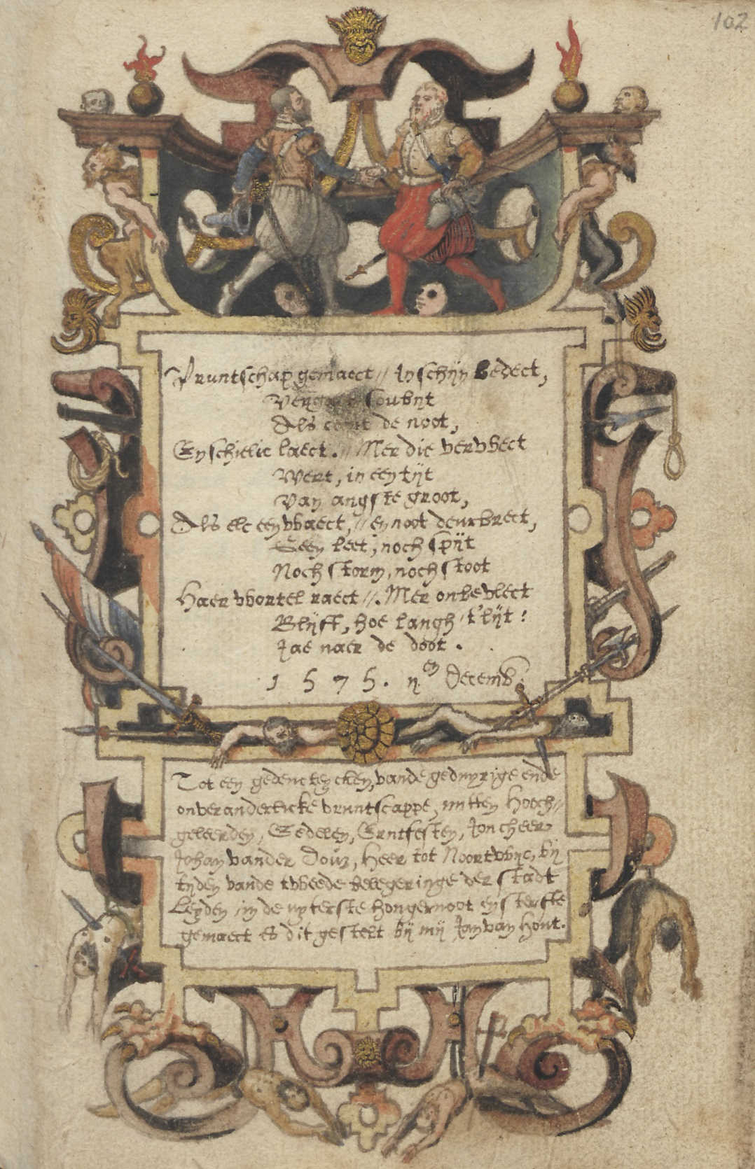 Album amicorum aangelegd door Janus Dousa (1545-1604). Pagina 102r van Jan van Hout met zijn gedicht Vruntschap uit 1575 waarmee hij herinnert aan de samenwerking tussen Dousa en Van Hout tijdens het beleg van Leidens.